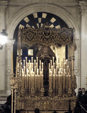 Dolores de Servitas